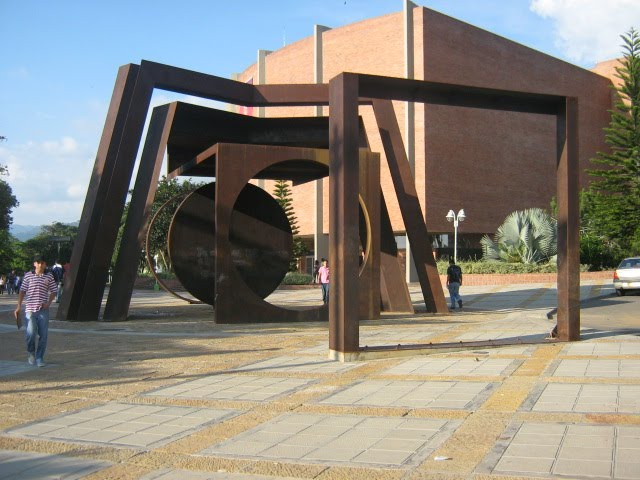 Ingreso a la Universidad Industrial de Santander, Monumento Lección de Geometría y Auditorio Luis A. Calvo